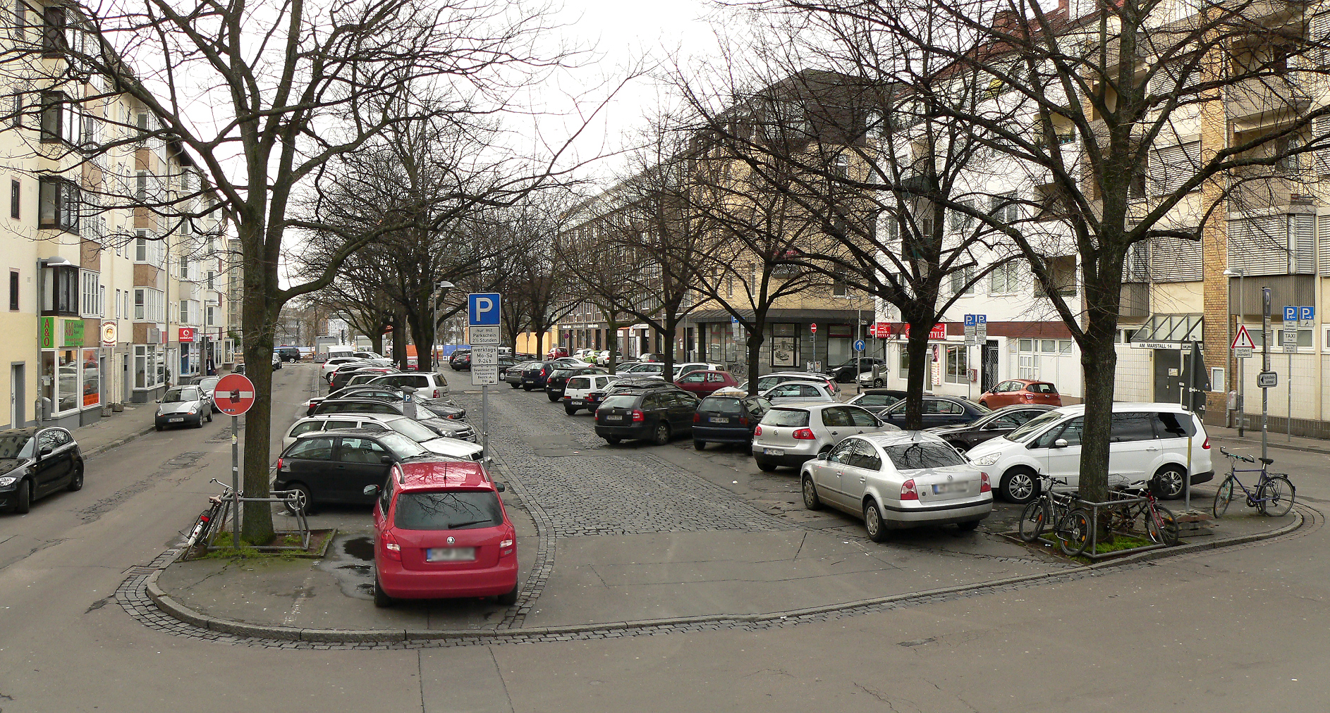 Am Marstall in Hannover, Parkplätze, Blick in Richtung Leine